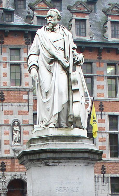 Statue du compositeur belge Servais par le scupteur Cyprian Godebski